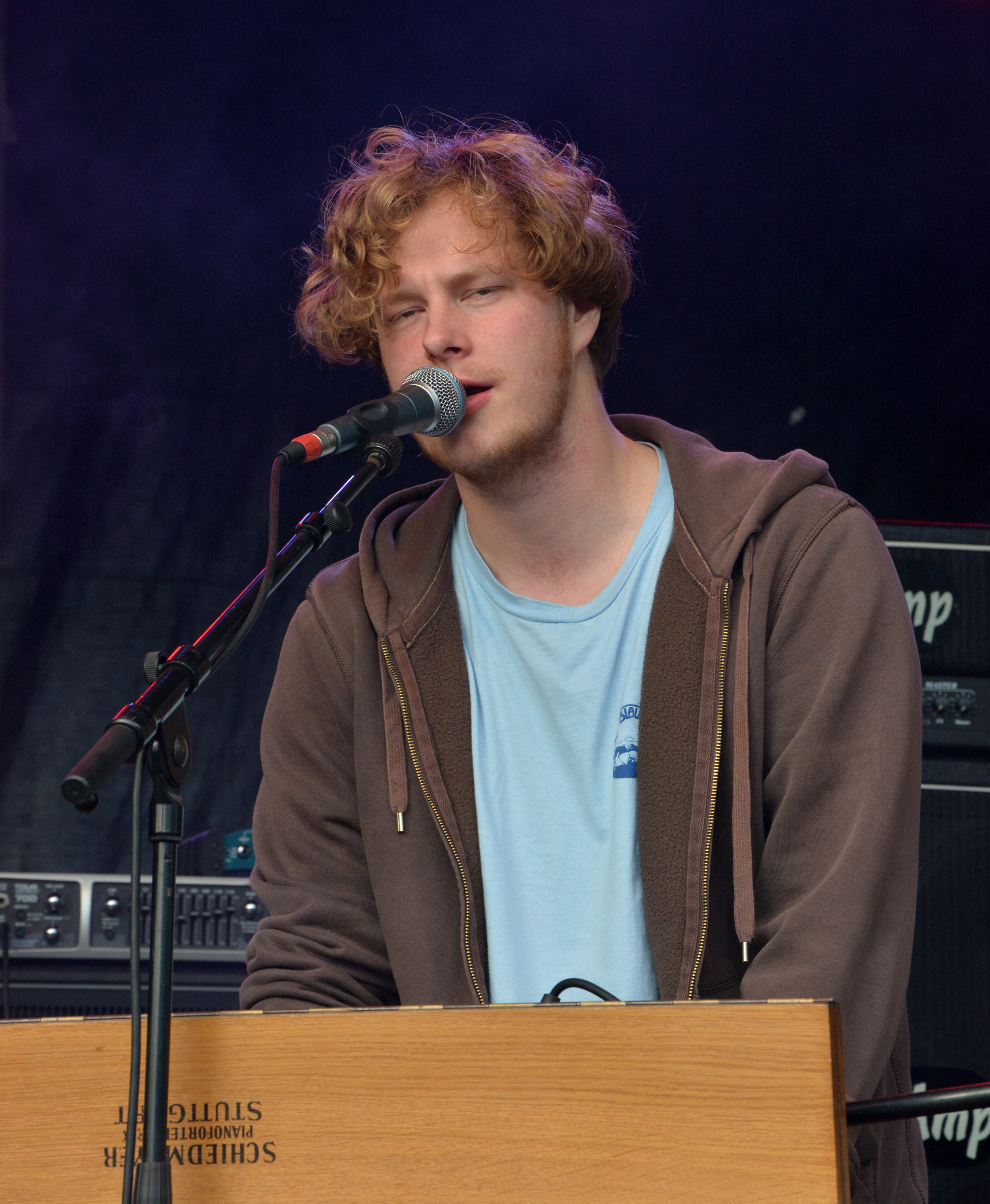 Ove Thomen von Torpus & the Art Directors auf dem Ackerfestival in Kummerfeld